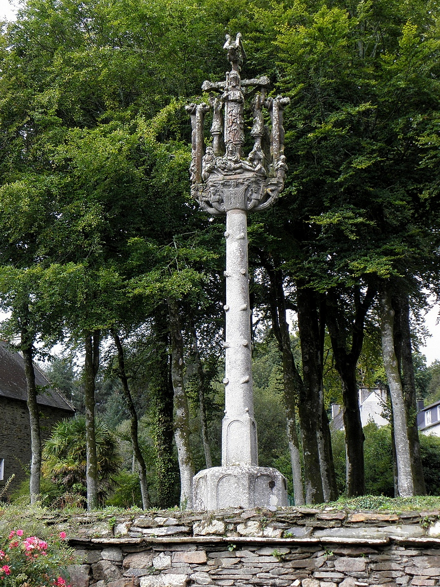 Calvaire de Saint-Herbot en Plonévez-du-Faou (29).Date de construction du calvaire